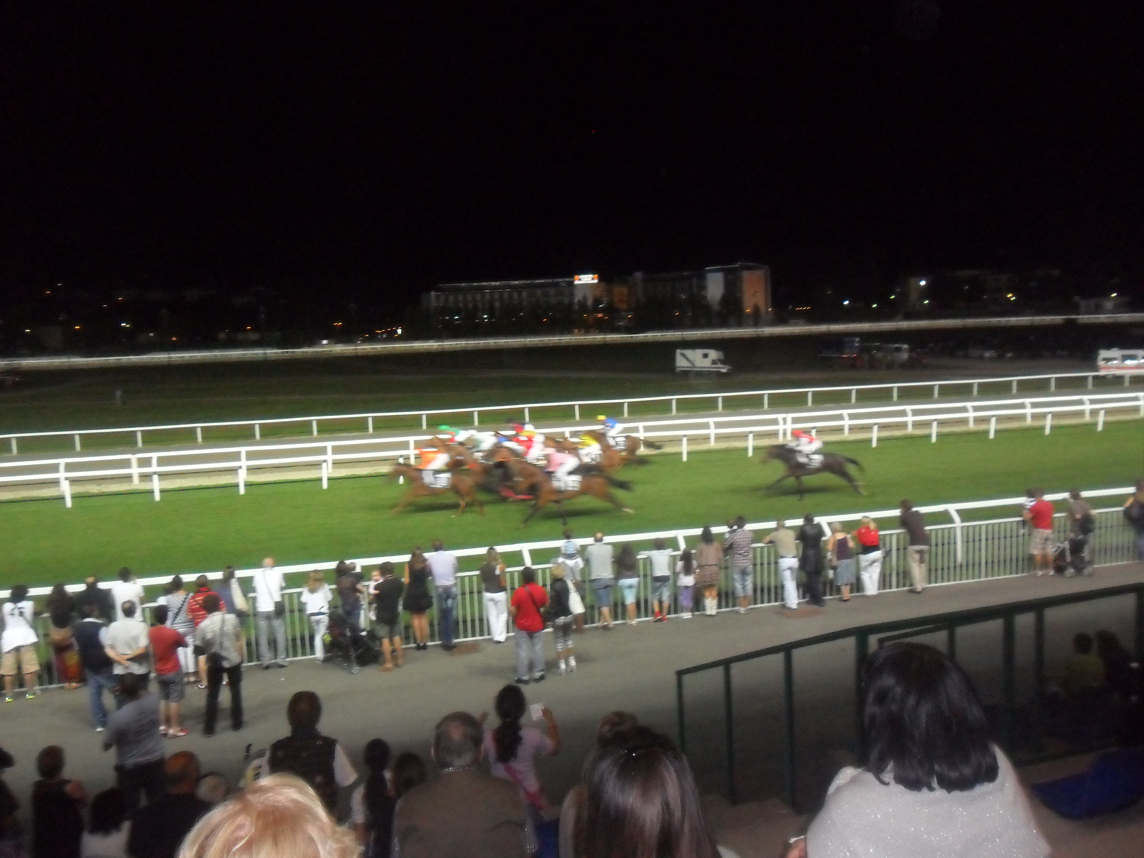 Corsa all'ippodromo di Varese Le Bettole